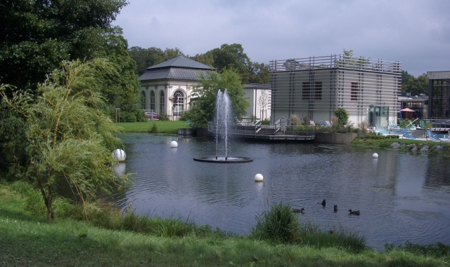 Bad Steben, Therme von der Moorwiese aus: Pavillon des Hörens (rechts) neben der Säulenwandelhalle, davor der Doppel-Springbrunnen